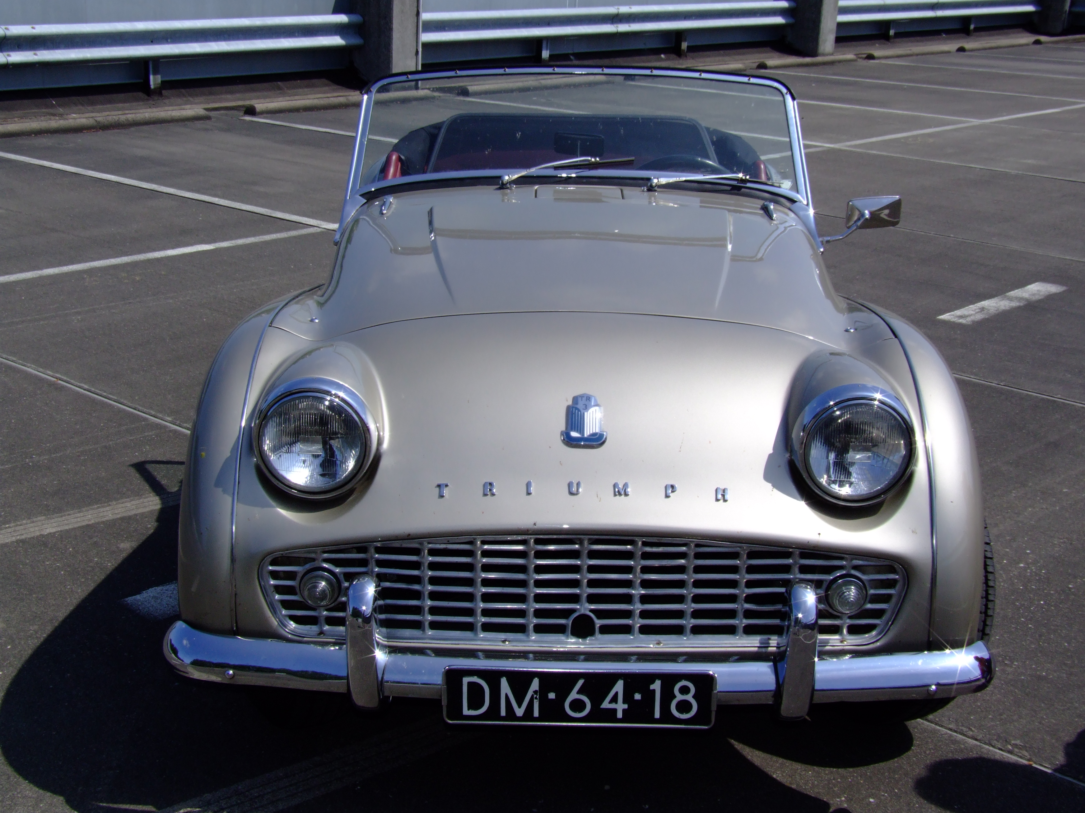 Triumph TR3